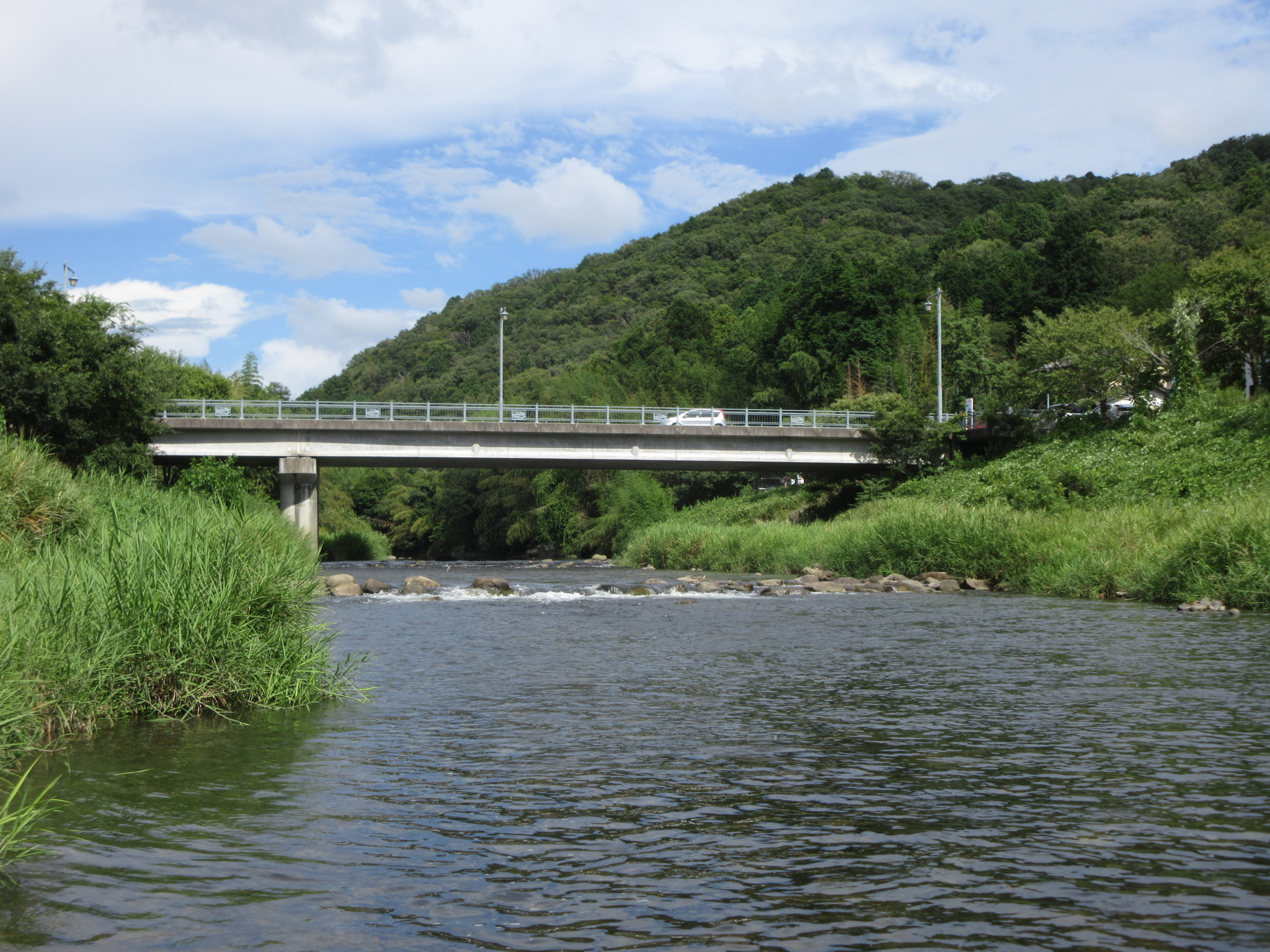 乙川（保母町、小美町）